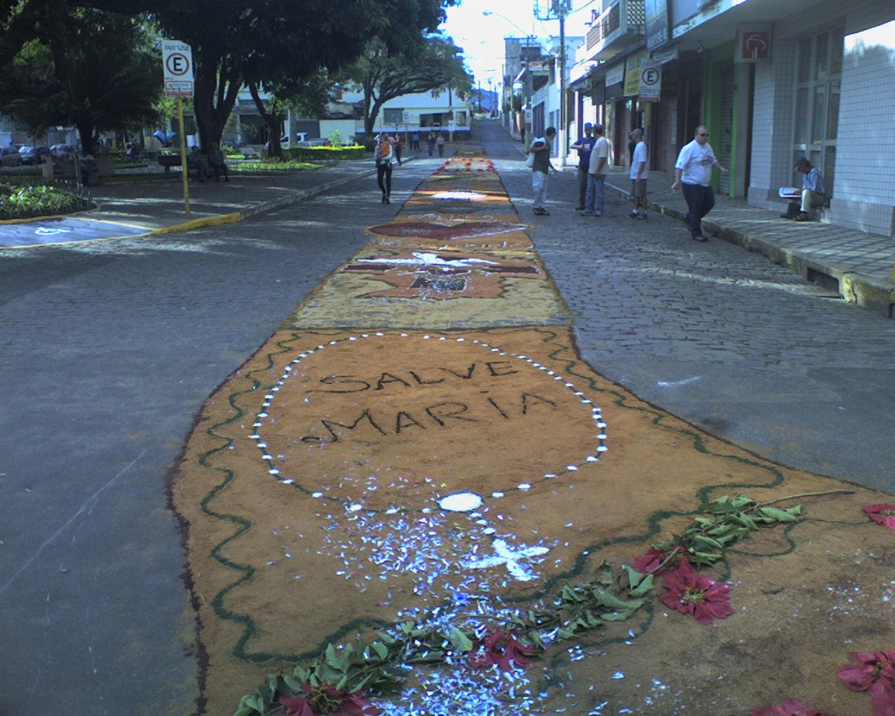 Enfeites de Corpus Christi em Itajubá